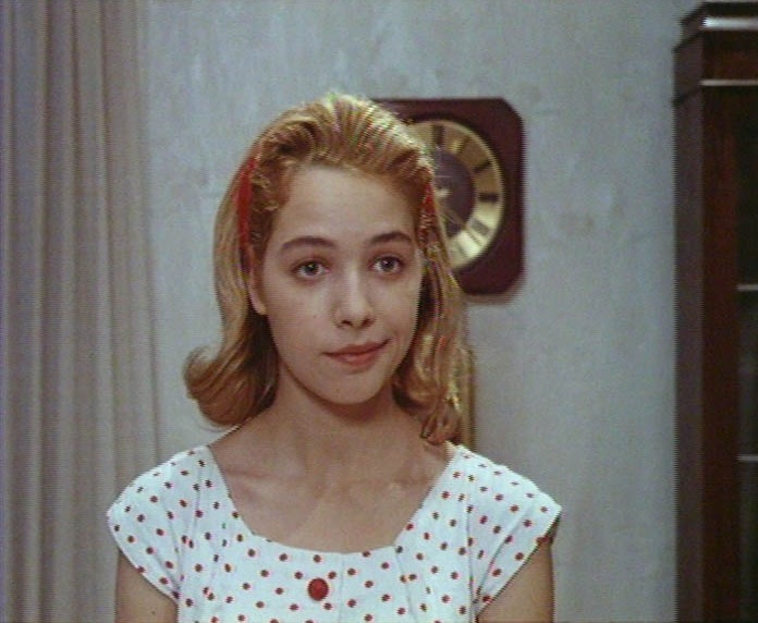 מילי אביטל בסרטו של יעקב גולדווסר, "מעבר לים ", 1991